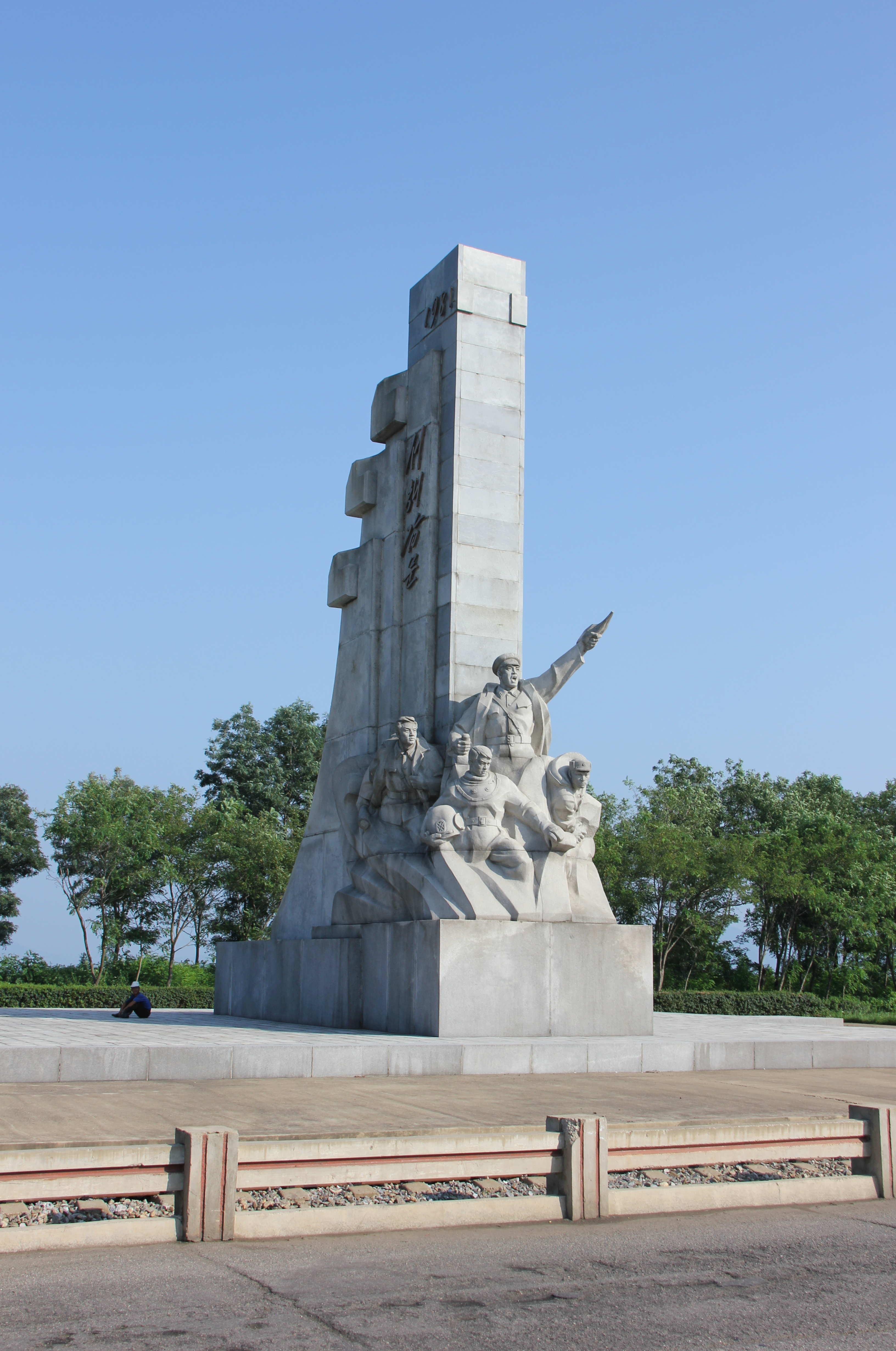 Nampo